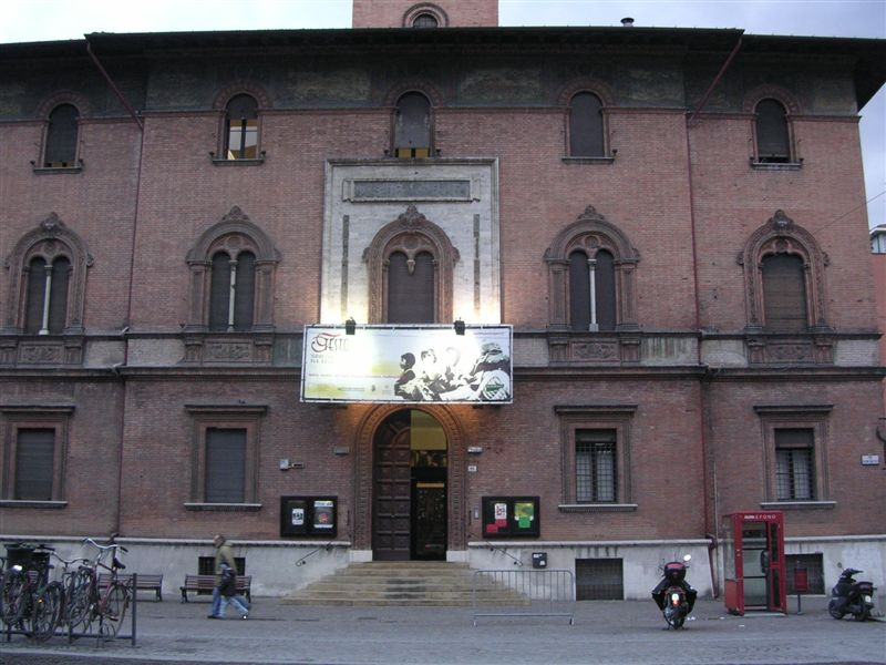 Teatro Testoni, Bologna, Italy